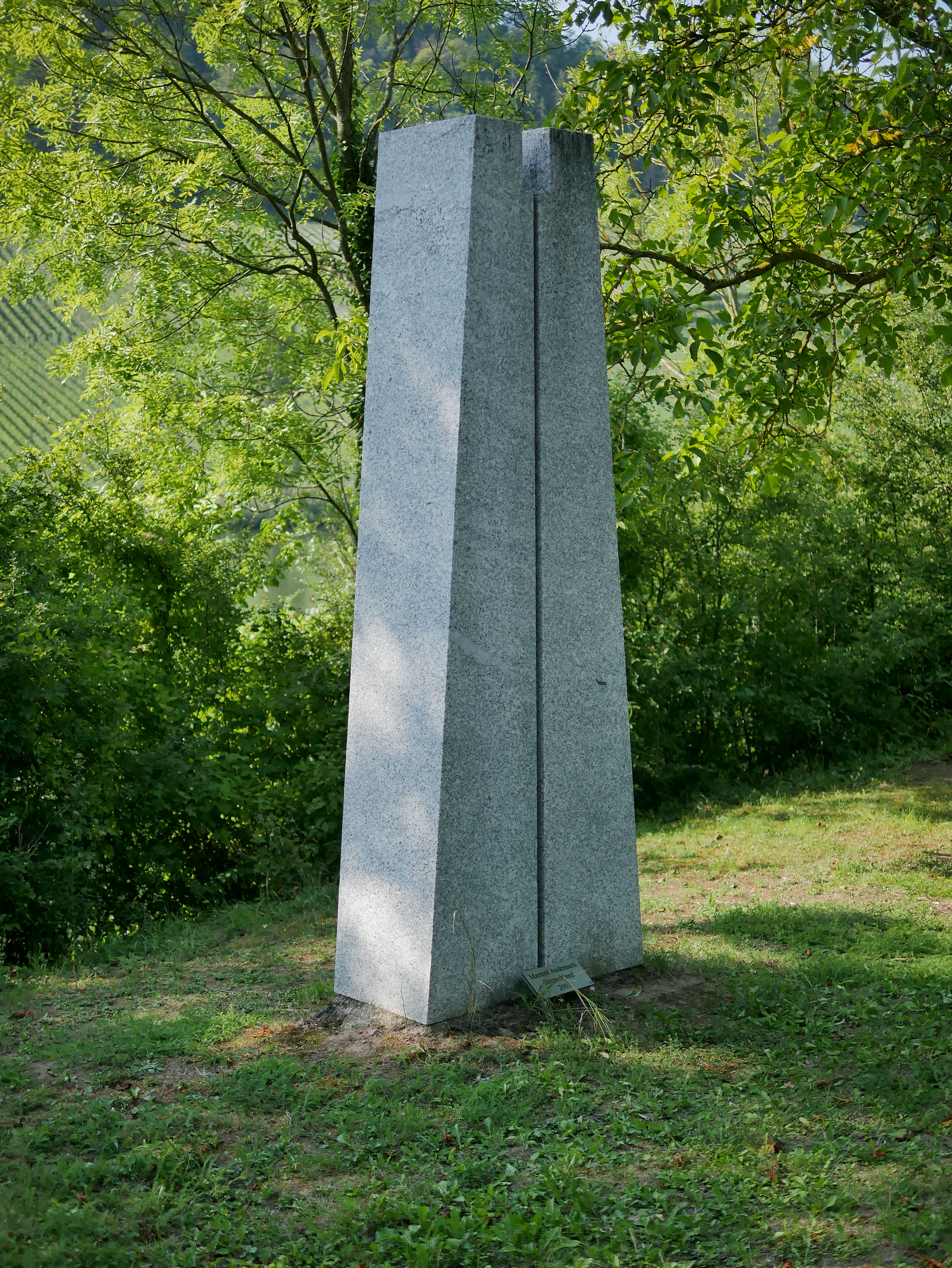 Martine Andernach; Wegmarke - Steine am Fluss; Die Skulptur "Wegmarke" von Martine Andernach besteht aus einem hellen Granit aus Sardinien dem gleichen Material wie Willi Bauers "Zeichen". Ein schmaler Schlitz zwischen beiden Teilen ermöglicht einen neuen Blick auf Fluss und Landschaft.